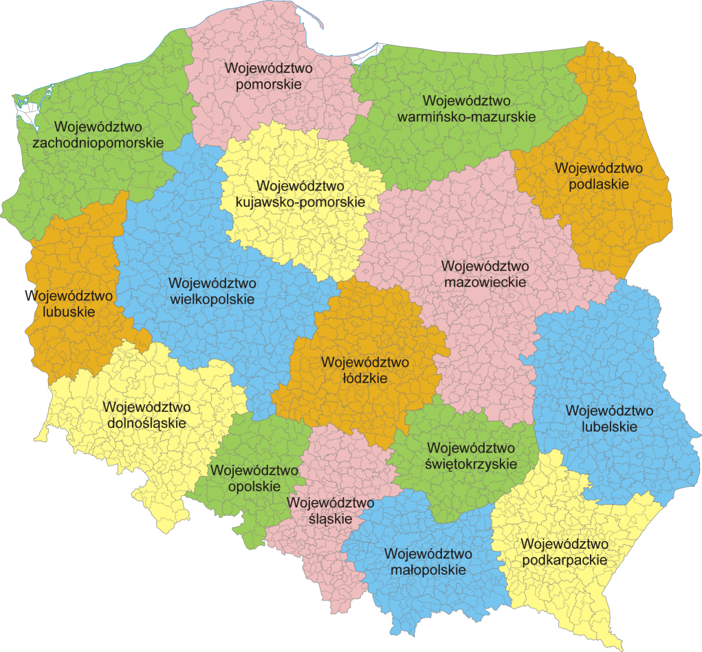 Mapa administracyjna Polski z zaznaczonymi granicami województw i gmin, stan na 1 stycznia 2007. Autor: Aotearoa Administrative map of Poland with borders of województwa (voivodships) and gminy (communes), as of January 1, 2007. By Aotearoa